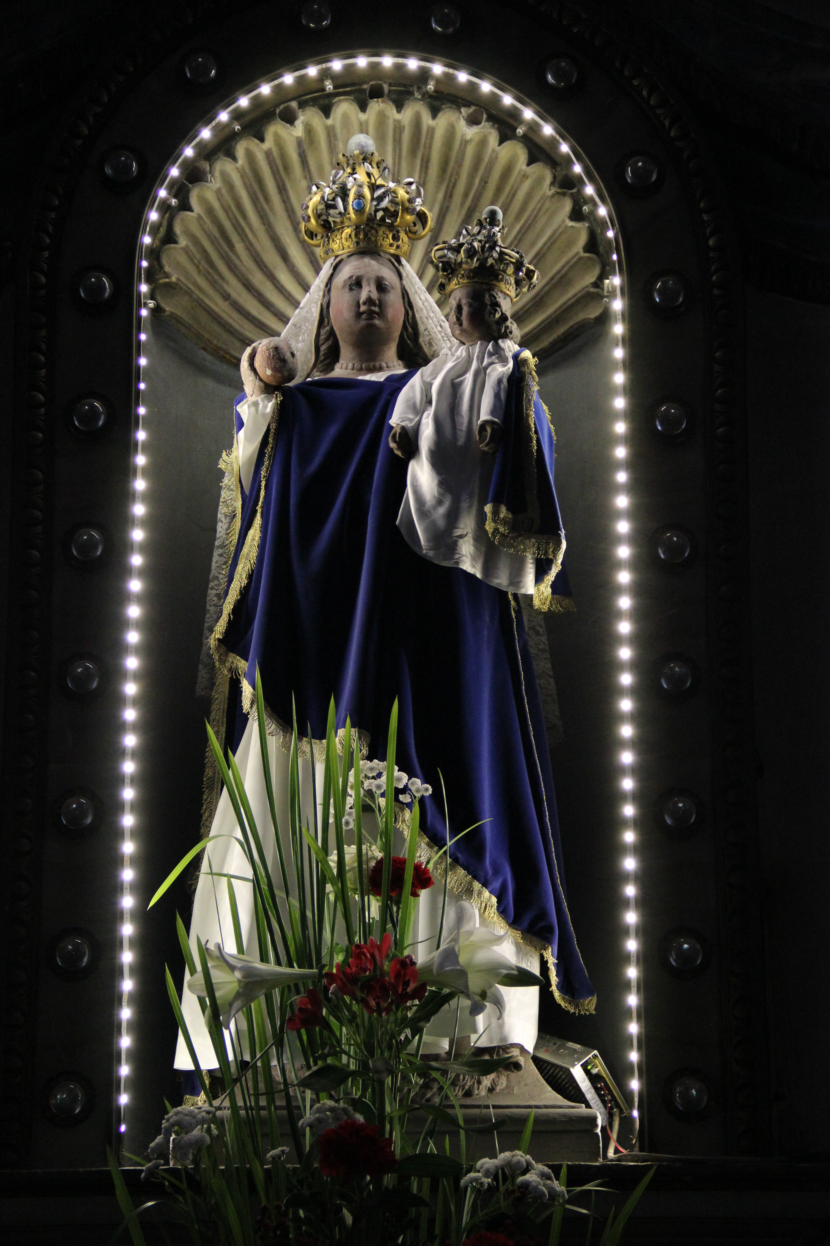 Statue de Notre-Dame de Benoite-Vaux à l'intérieur de l'église.